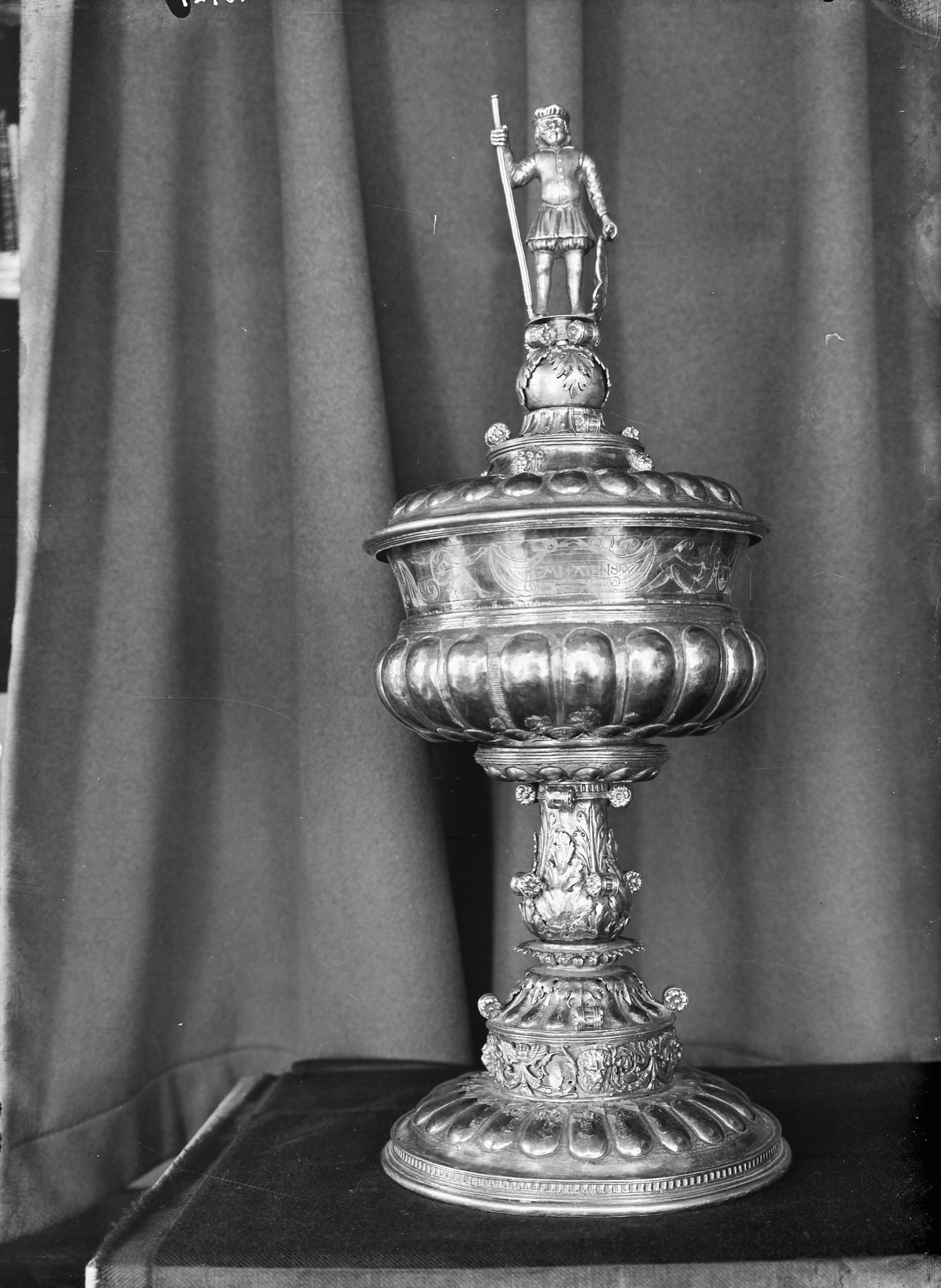 Raadhuis: beker van "Bossu"